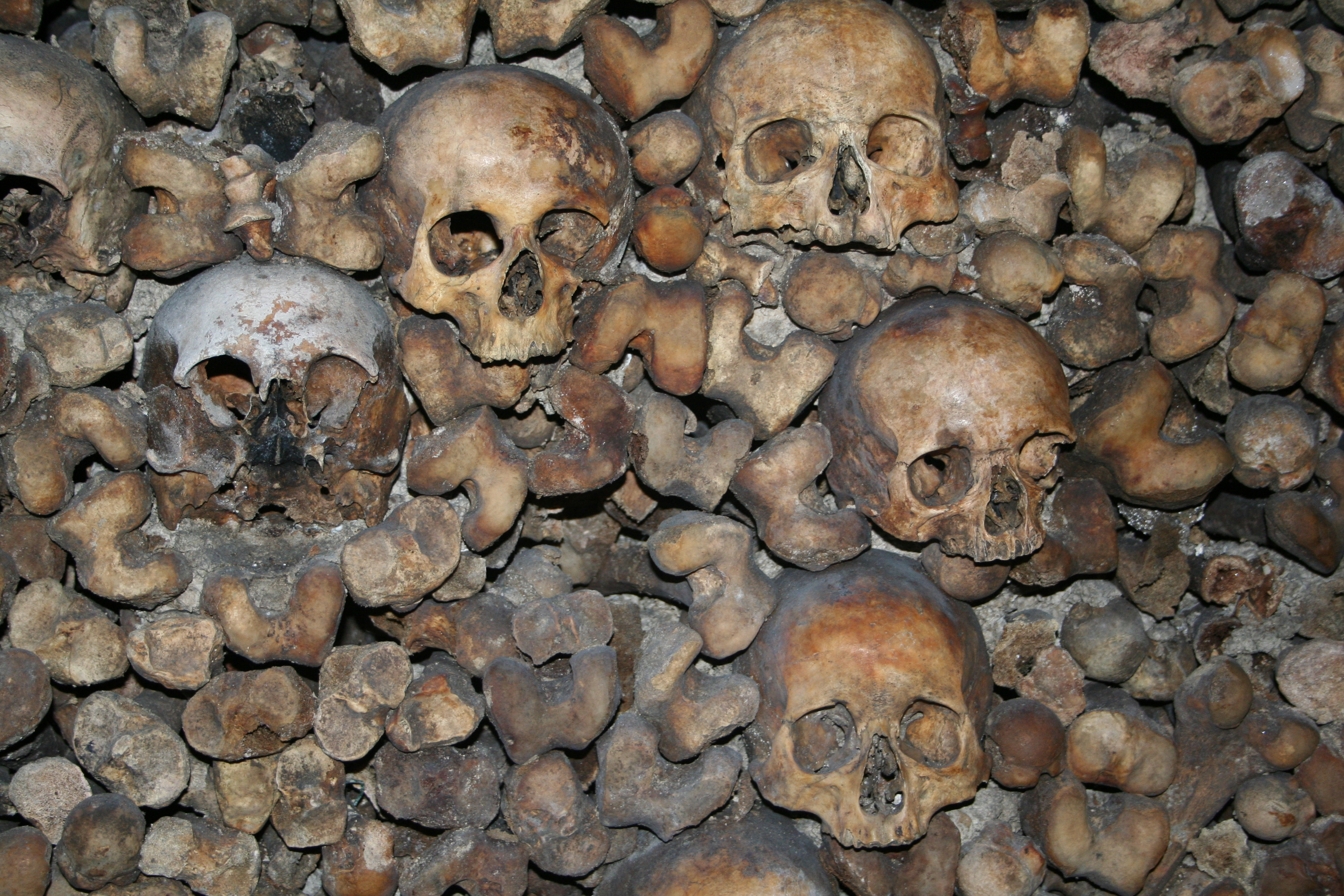 ... og flere knogler og kranier.